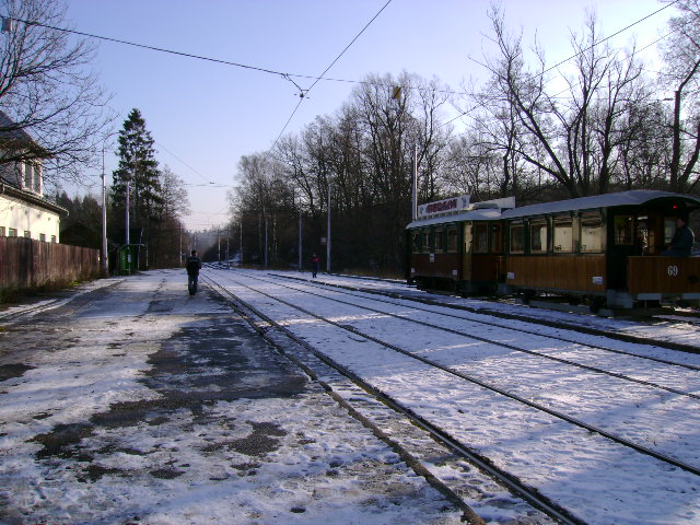 Prostor na konečné Zátiší v Kyjovicích-Budišovicích